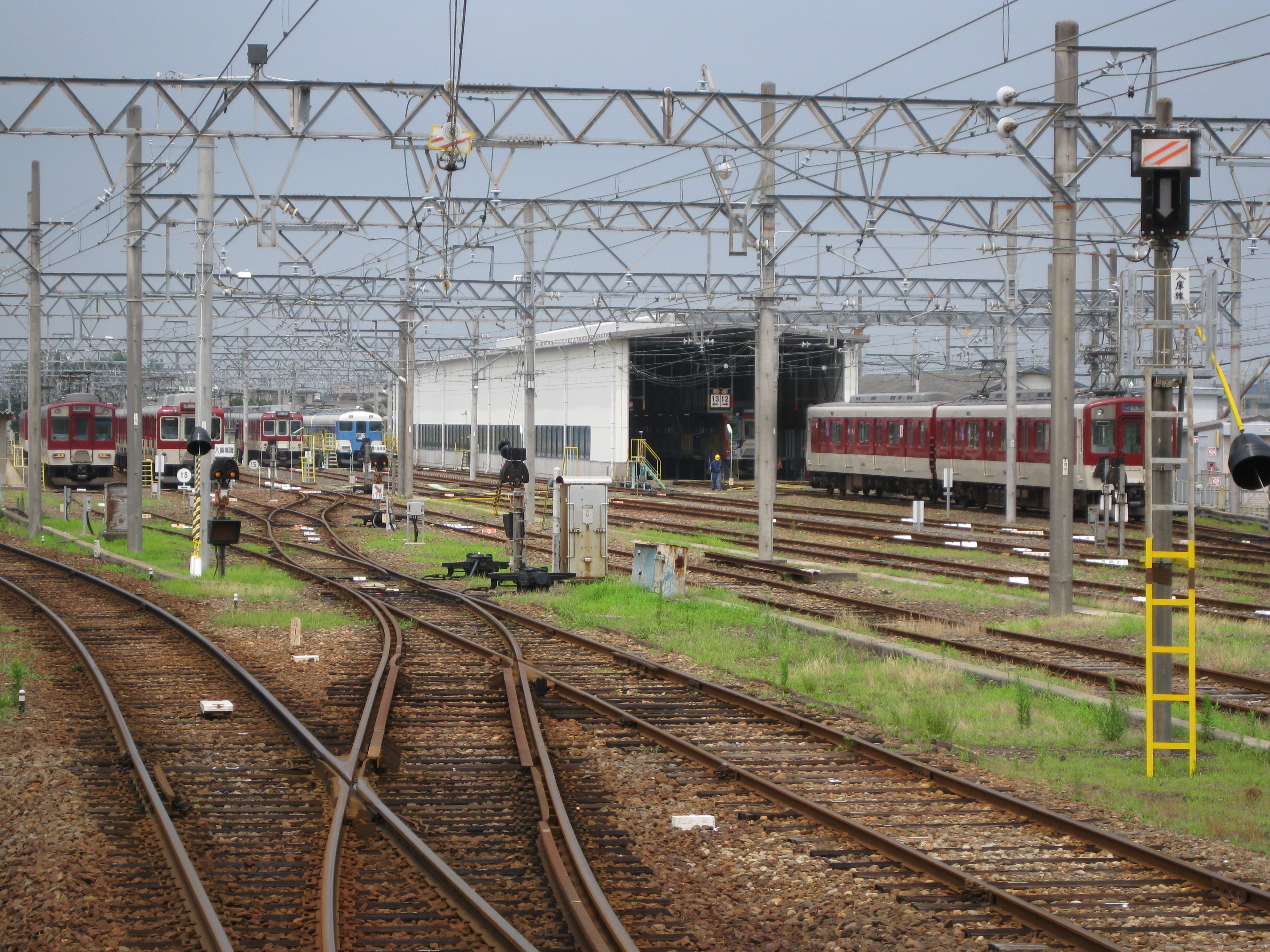 白塚検車区白塚車庫